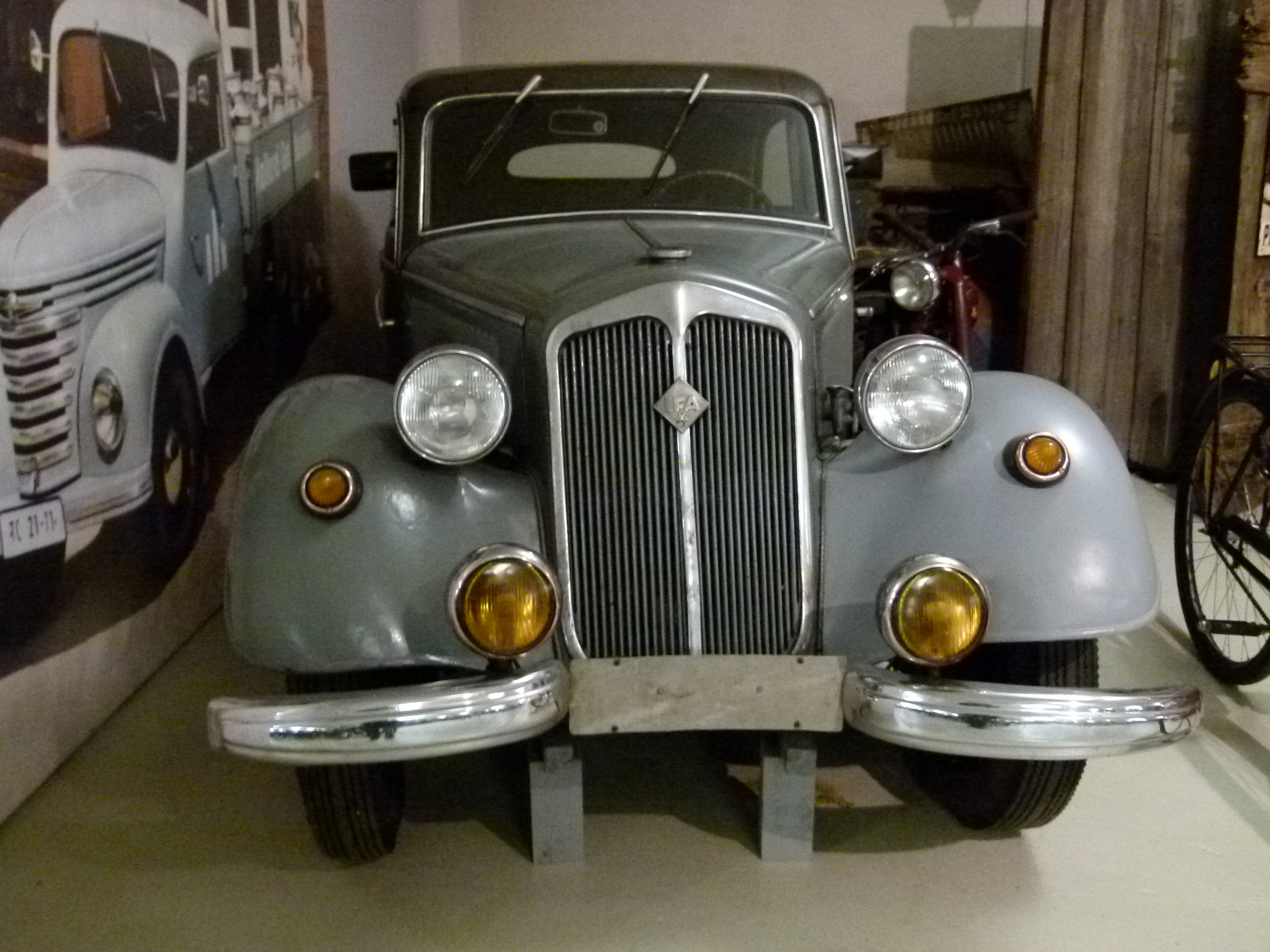 IFA F8, Fahrzeugmuseum Chemnitz